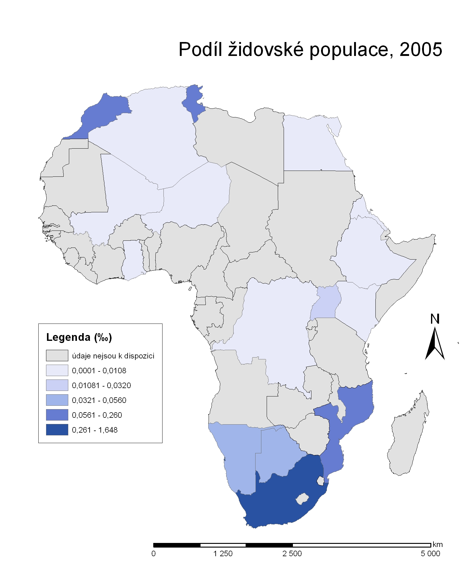 Podíl židovské populace na africkém kontinentu